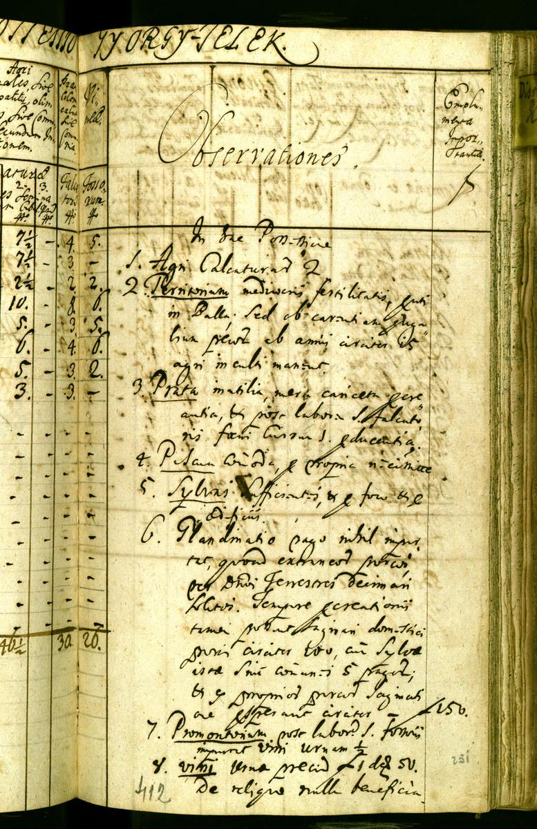 Census 1715 in Giurtelecu Simleului